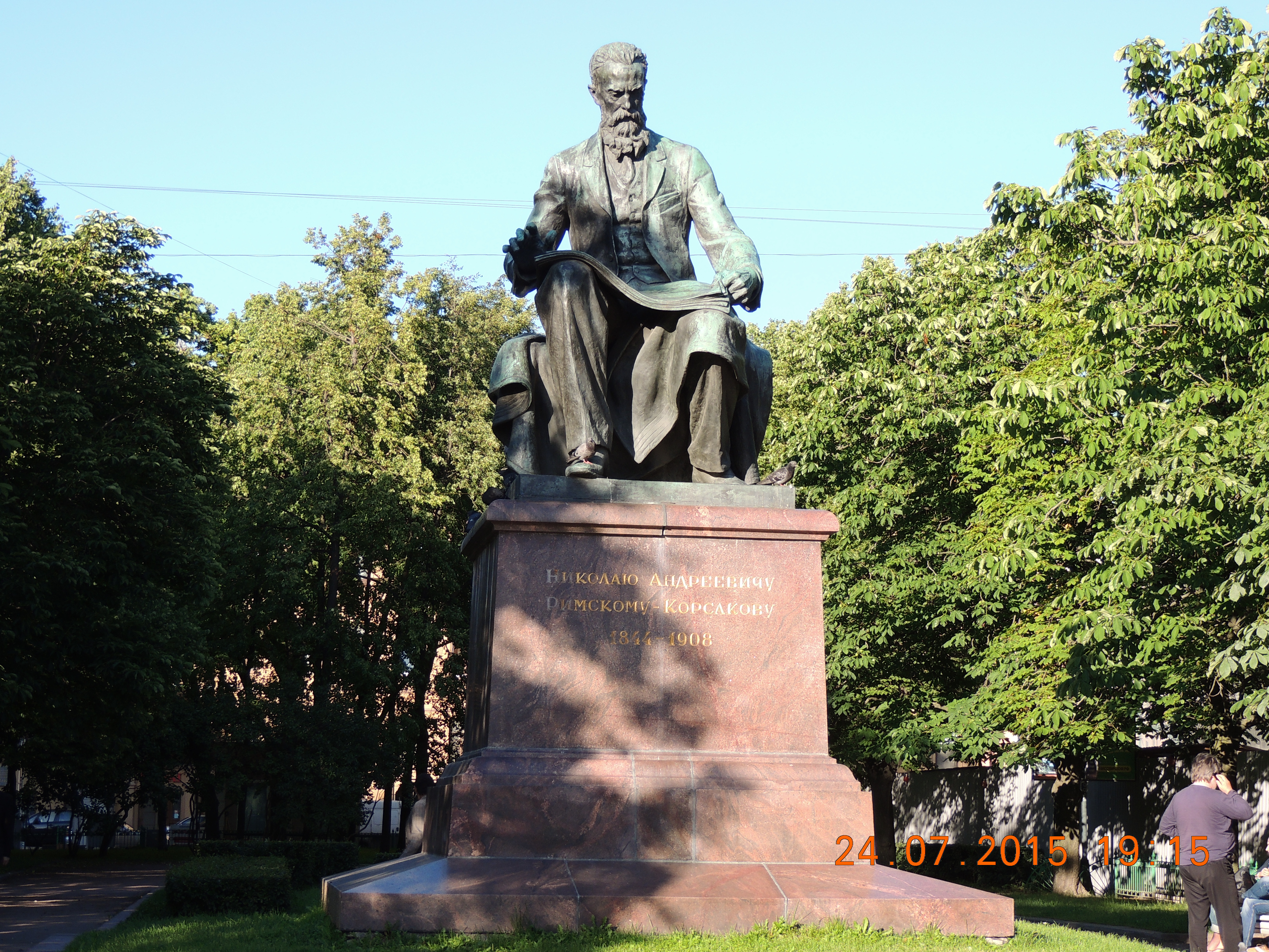 Rimsky-Korsakov, Nikolay Andreyevich